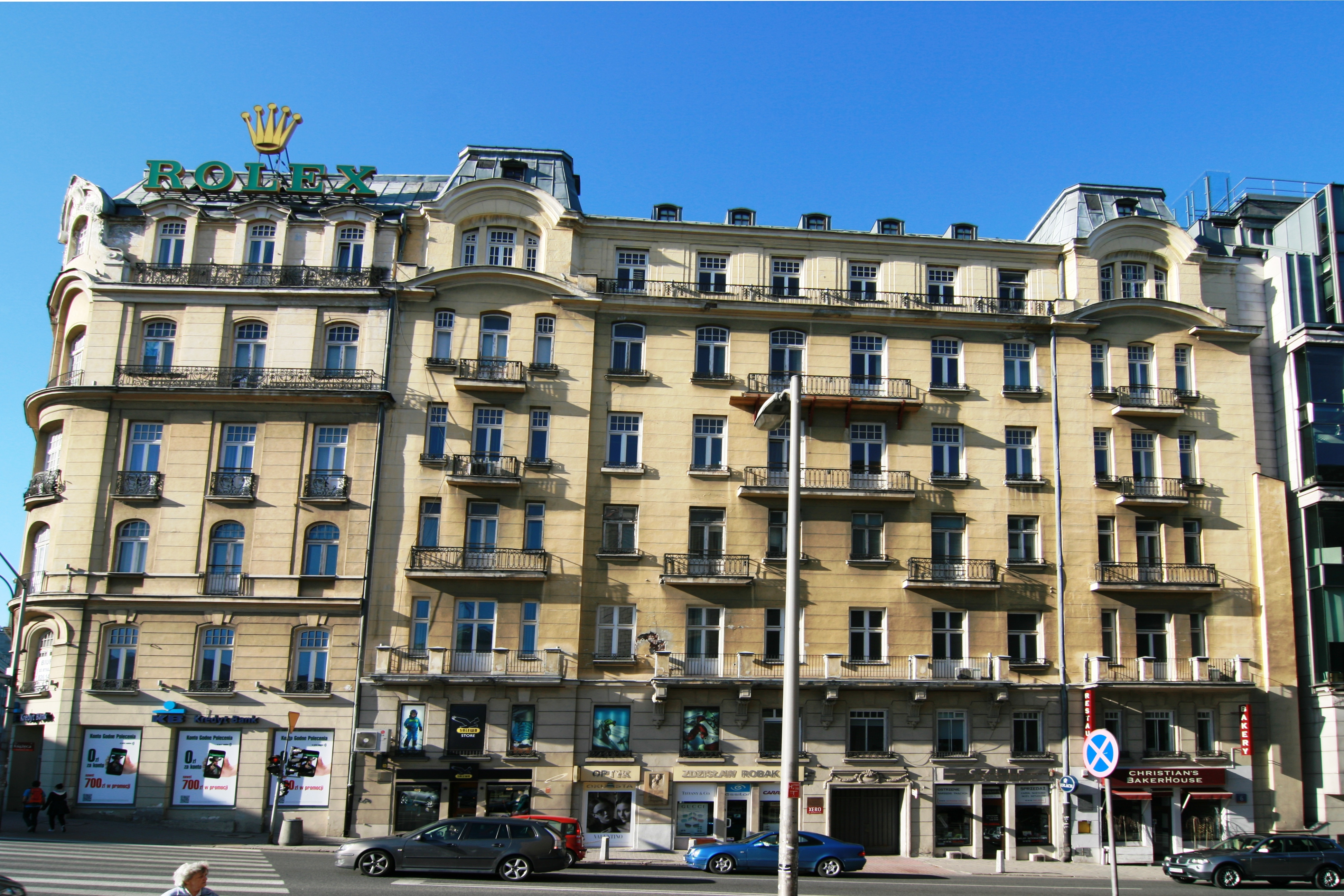 Widok na północną pierzeję ul. Książęcej u jej wylotu na Plac Trzech Krzyży. Po lewej budynek przy ul. Nowy Świat 2, po lewej – Książęca 6